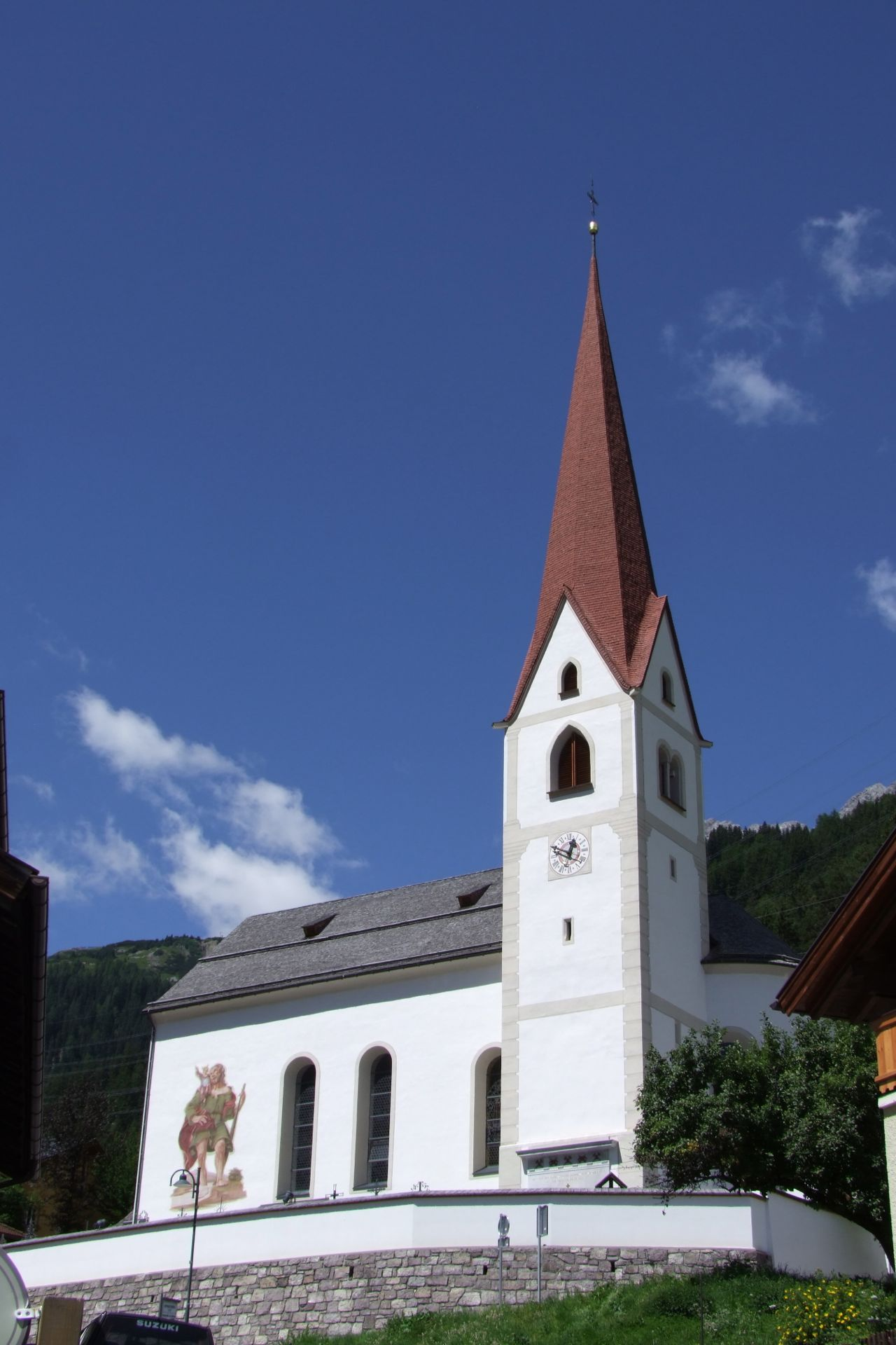 Kath. Pfarrkirche hl. Jakobus d. Ä.